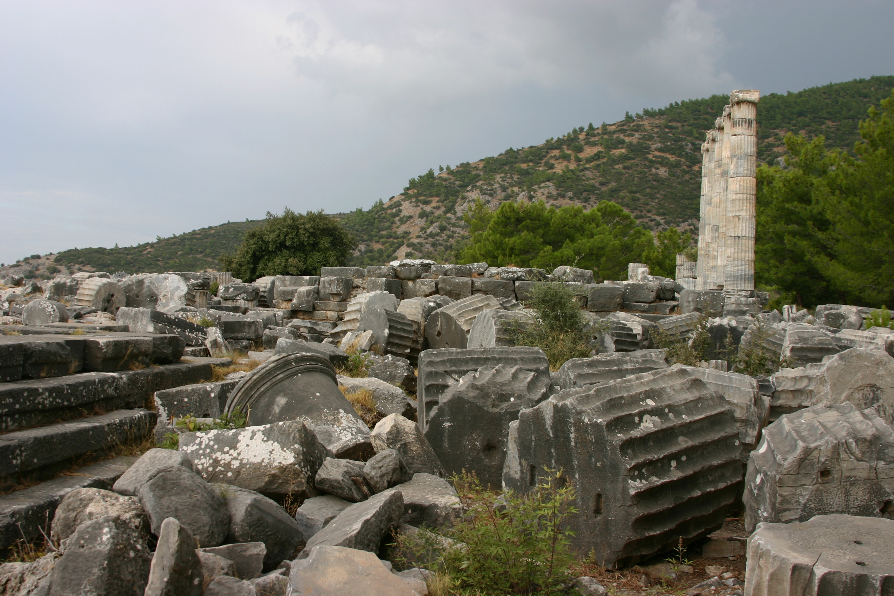 Ruínas em Priene.